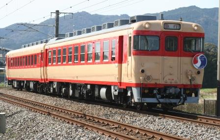 リバイバル急行「ちくご」